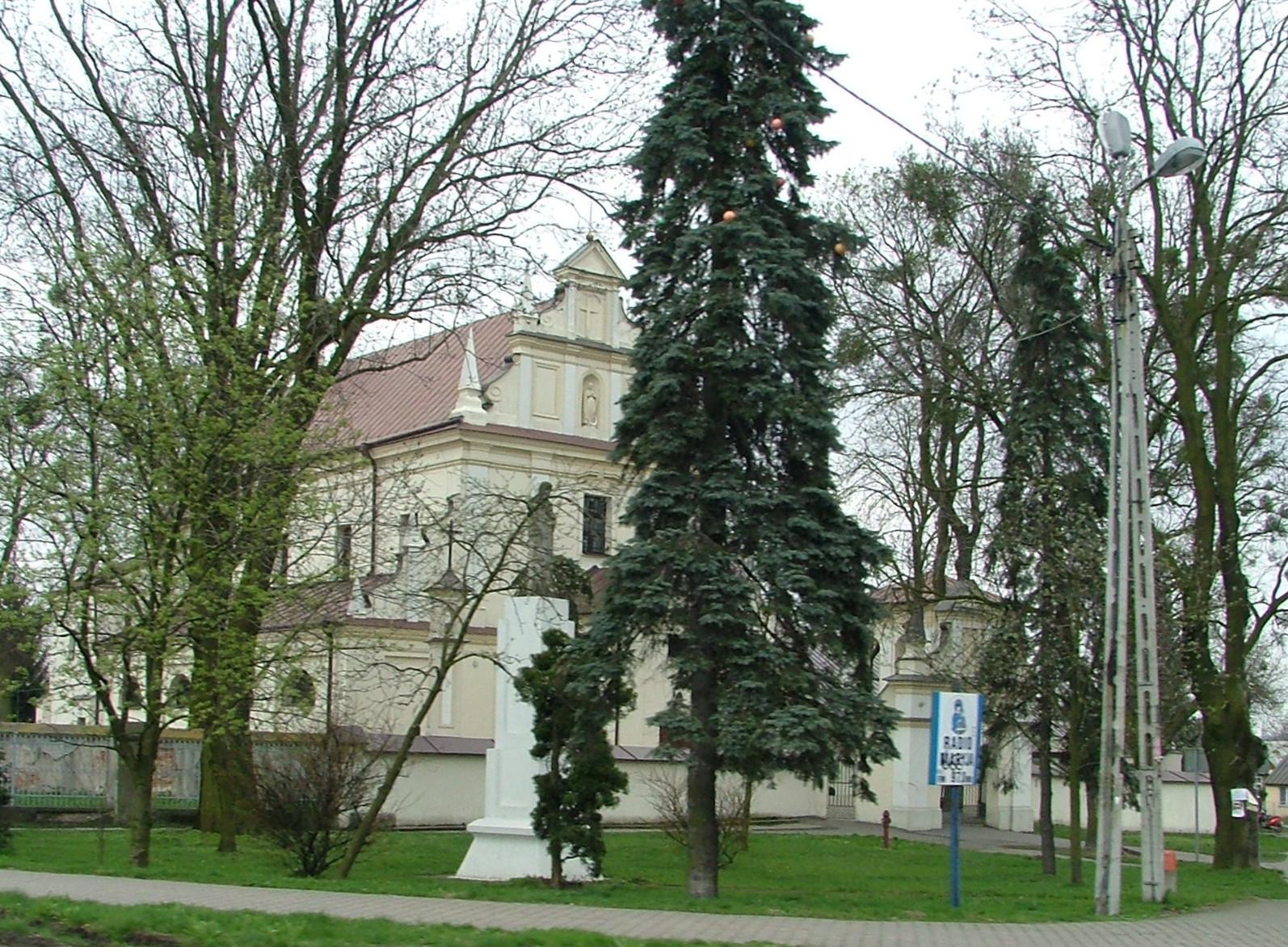 Kurów - kościół par. p.w. Narodzenia NMP i św. Michała Archanioła